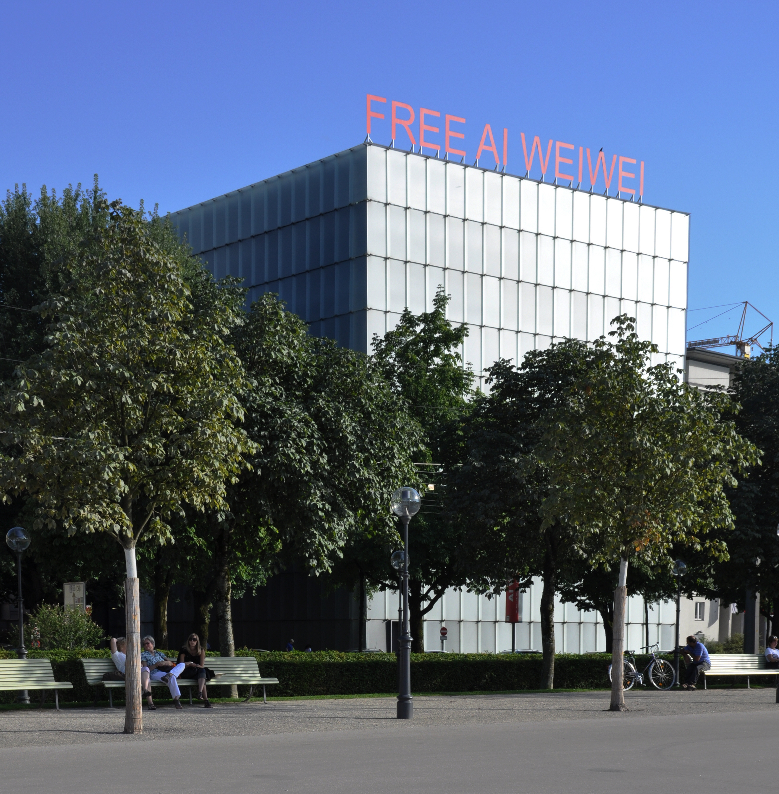 Bregenz, Kunsthaus mit Schriftzug Free Ai Weiwei (anlässlich einer Ai-Weiwei-Ausstellung)